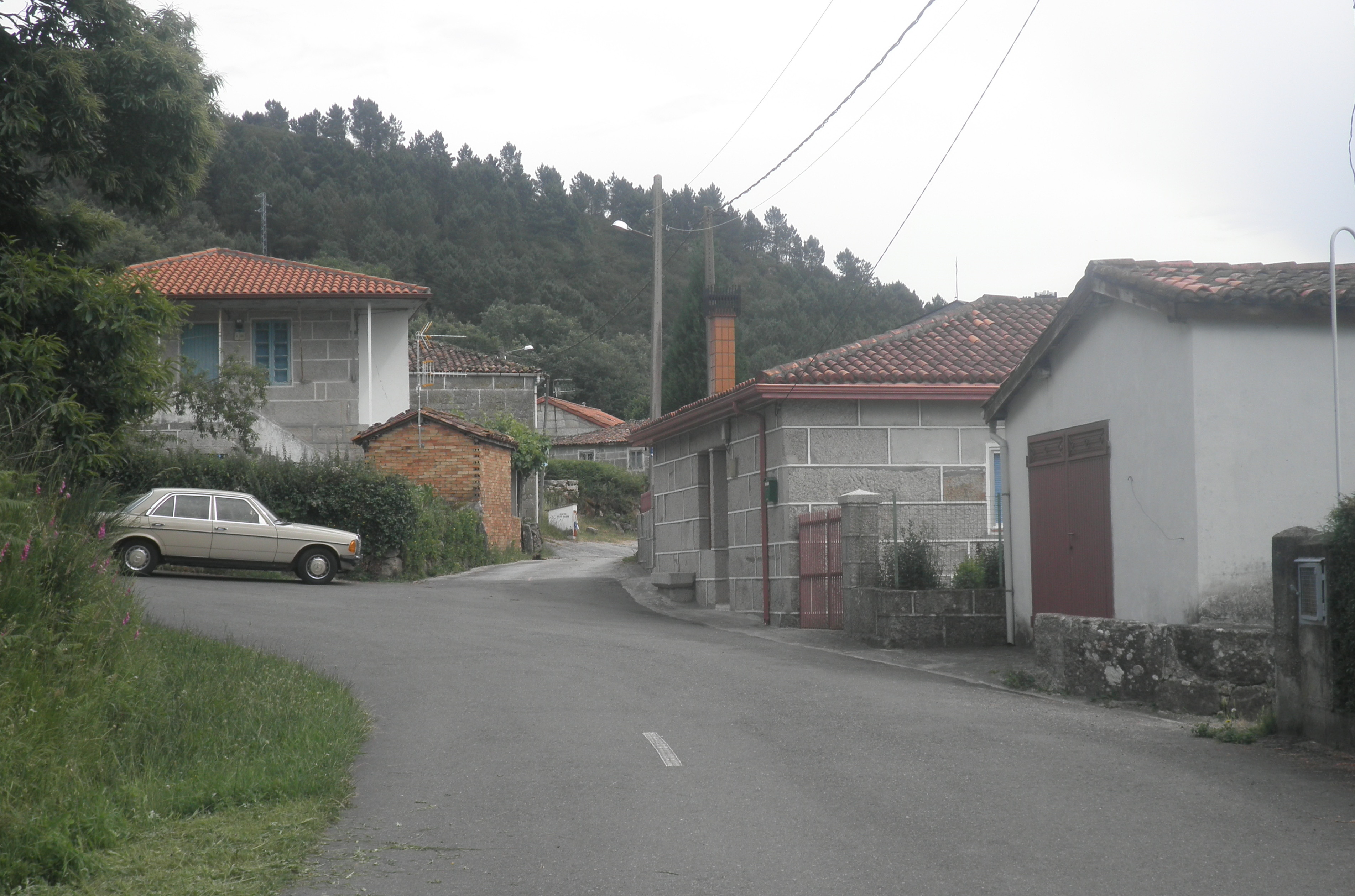 Taboadela, Figueiroá, Paderne de Allariz